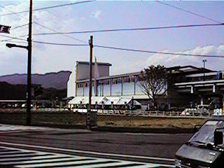 宿毛駅本屋(事故前)